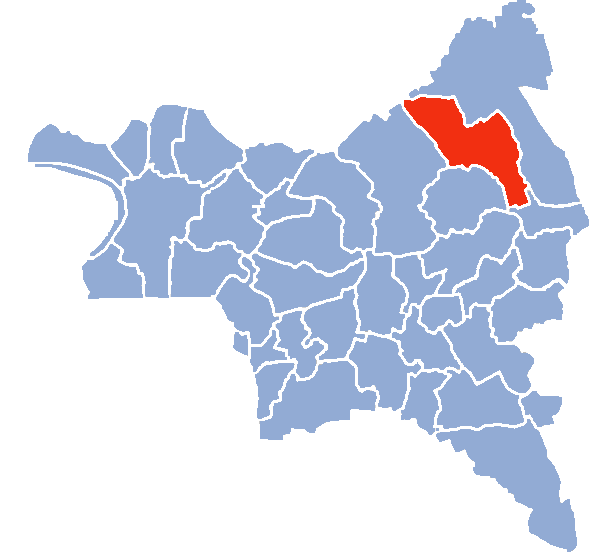 Auteur Hervé SUAUDEAU Licensing Catégorie:Cartes de Seine-saint-Denis